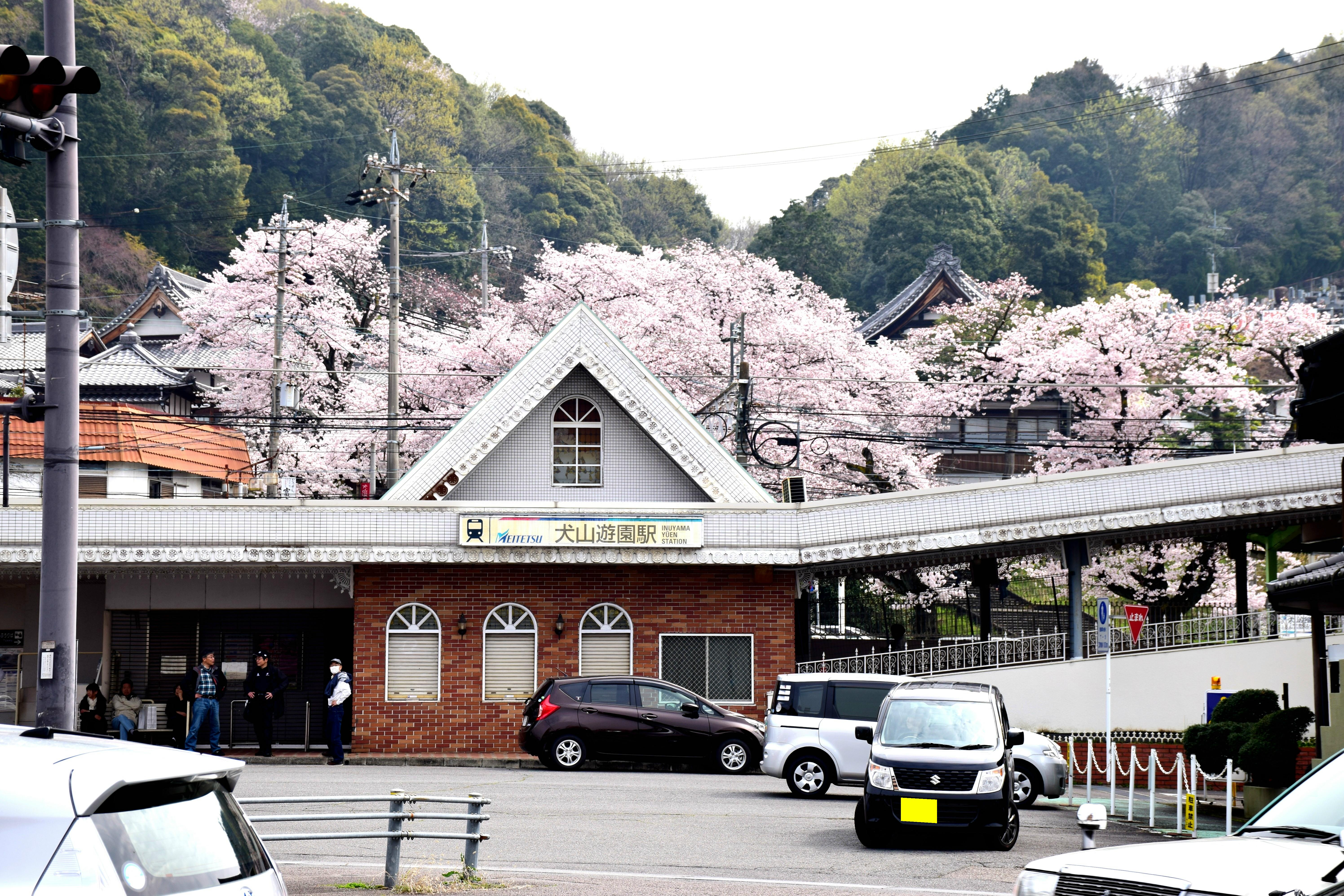 犬山遊園駅